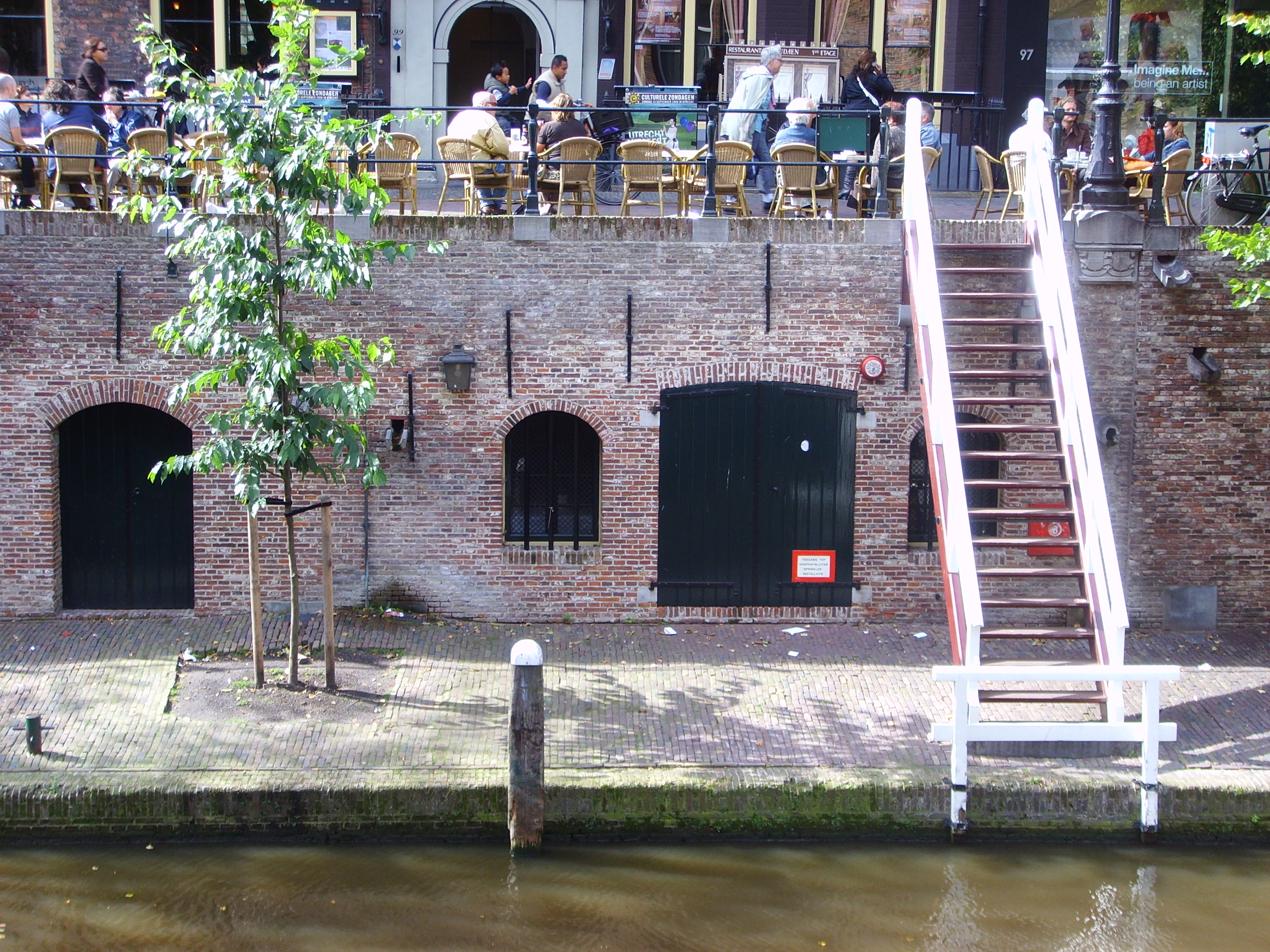 Werf aan de Oudegracht in de Utrechtse binnenstad - Google Maps - Google Earth